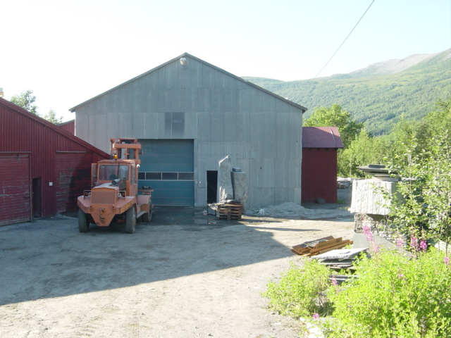 Vistdalitt